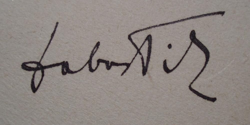 Dabas Tibor költő névaláírása